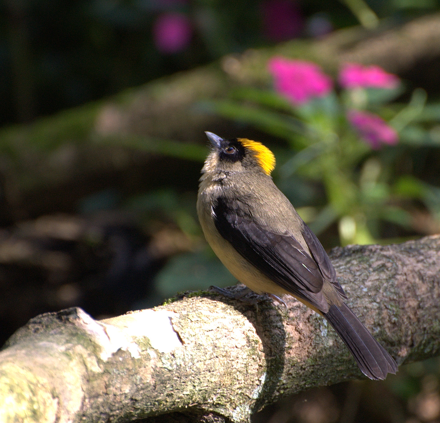 Horto Florestal de São Paulo